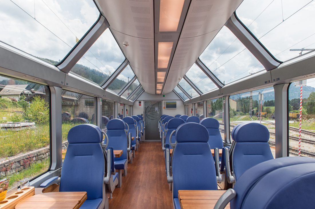 Innenansicht eines Panoramawagens der Mariazellerbahn im Bahnhof Mariazell.